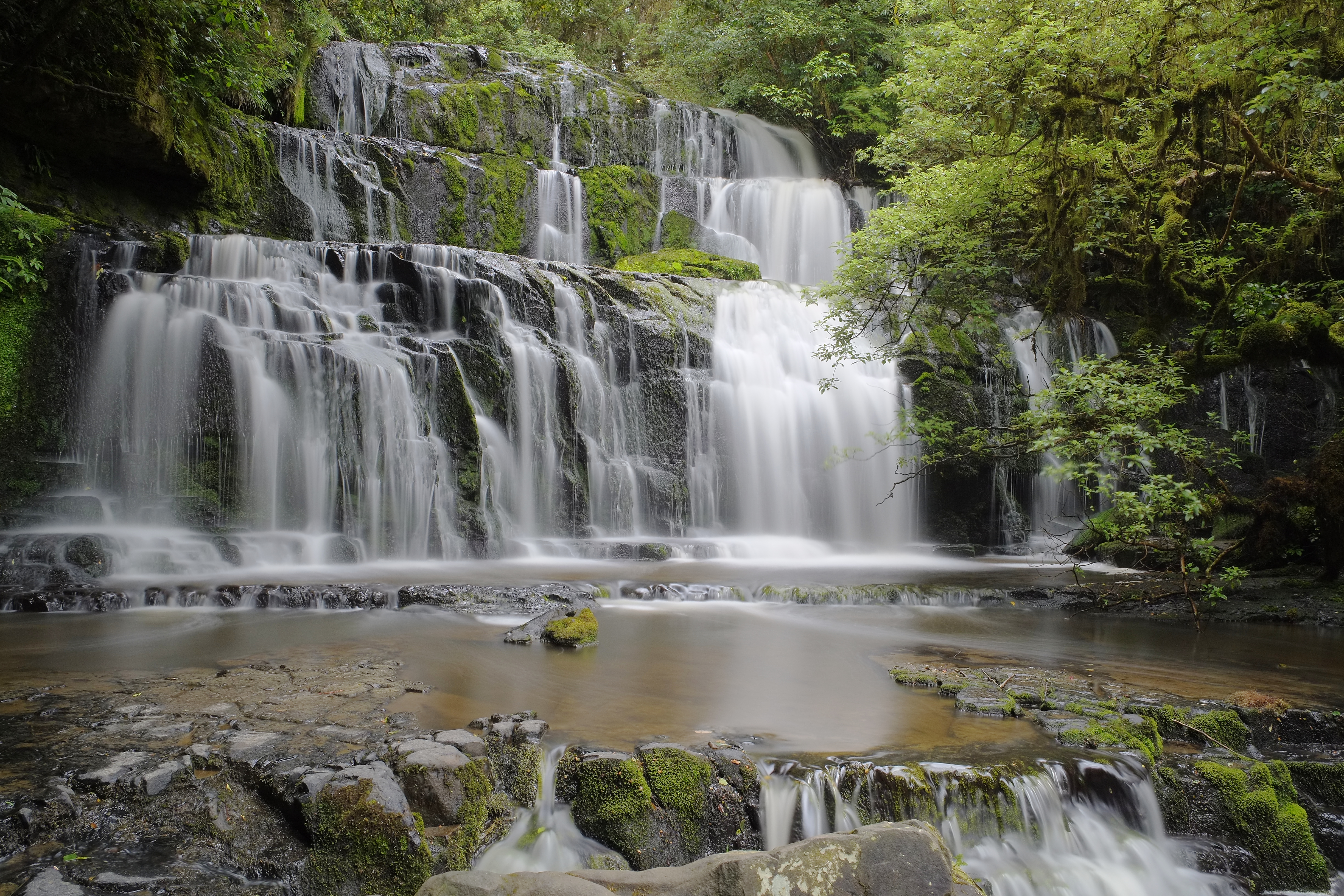 Purakaunui Falls